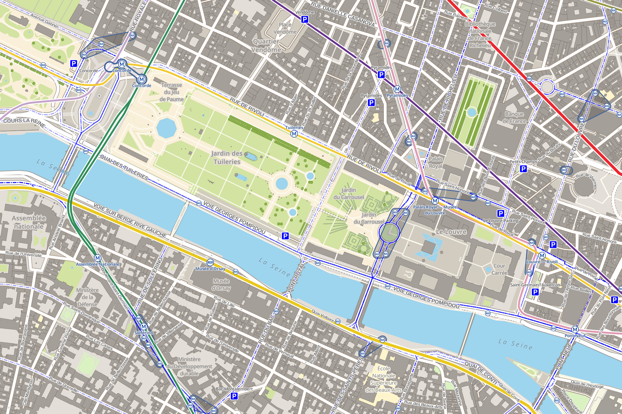 Carte montrant les stations de métro, de bus et les parcs de stationnements autour du musée du Louvre de Paris. Cette carte est réalisée grâce aux données d'OpenStreetMap et grâce aux logiciels libres TileMill, PostgreSQL, PostGIS et osm2pgsql. Les logos RATP de la carte proviennent de File:Metro-M.svg et File:Paris_logo_bus_jms.svg.